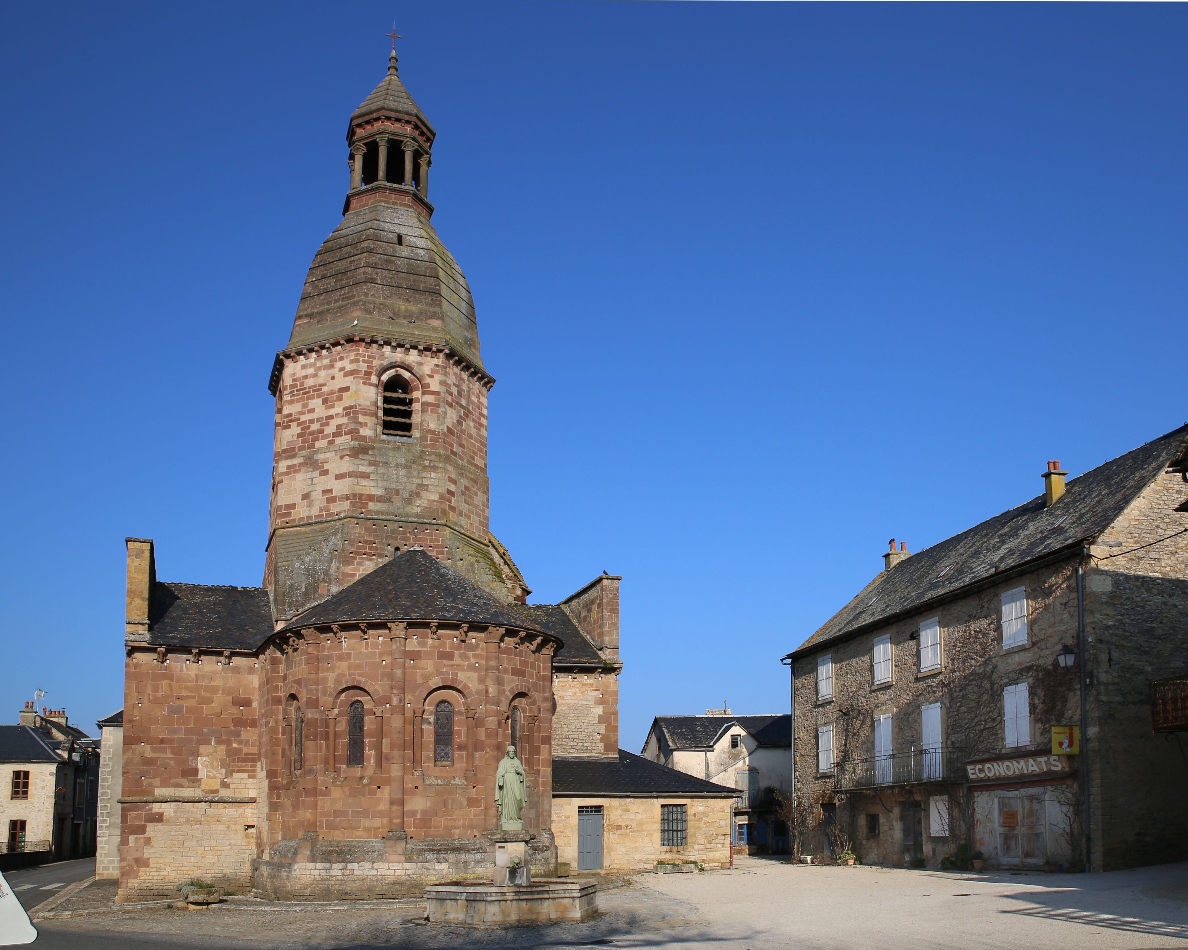 Place de l'église à Saint-Saturnin-de-Lenne